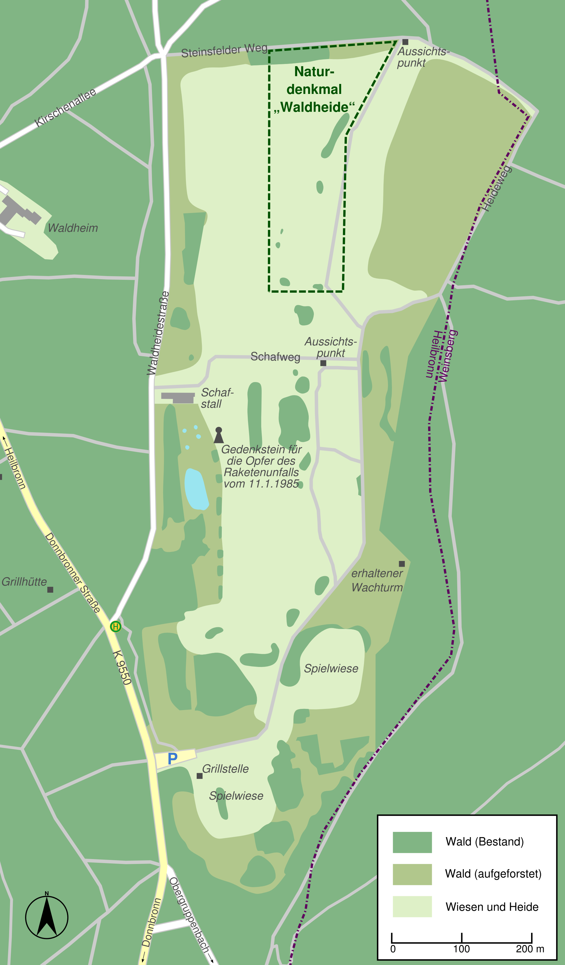 Karte der Heilbronner Waldheide nach der Renaturierung (nach 1996).